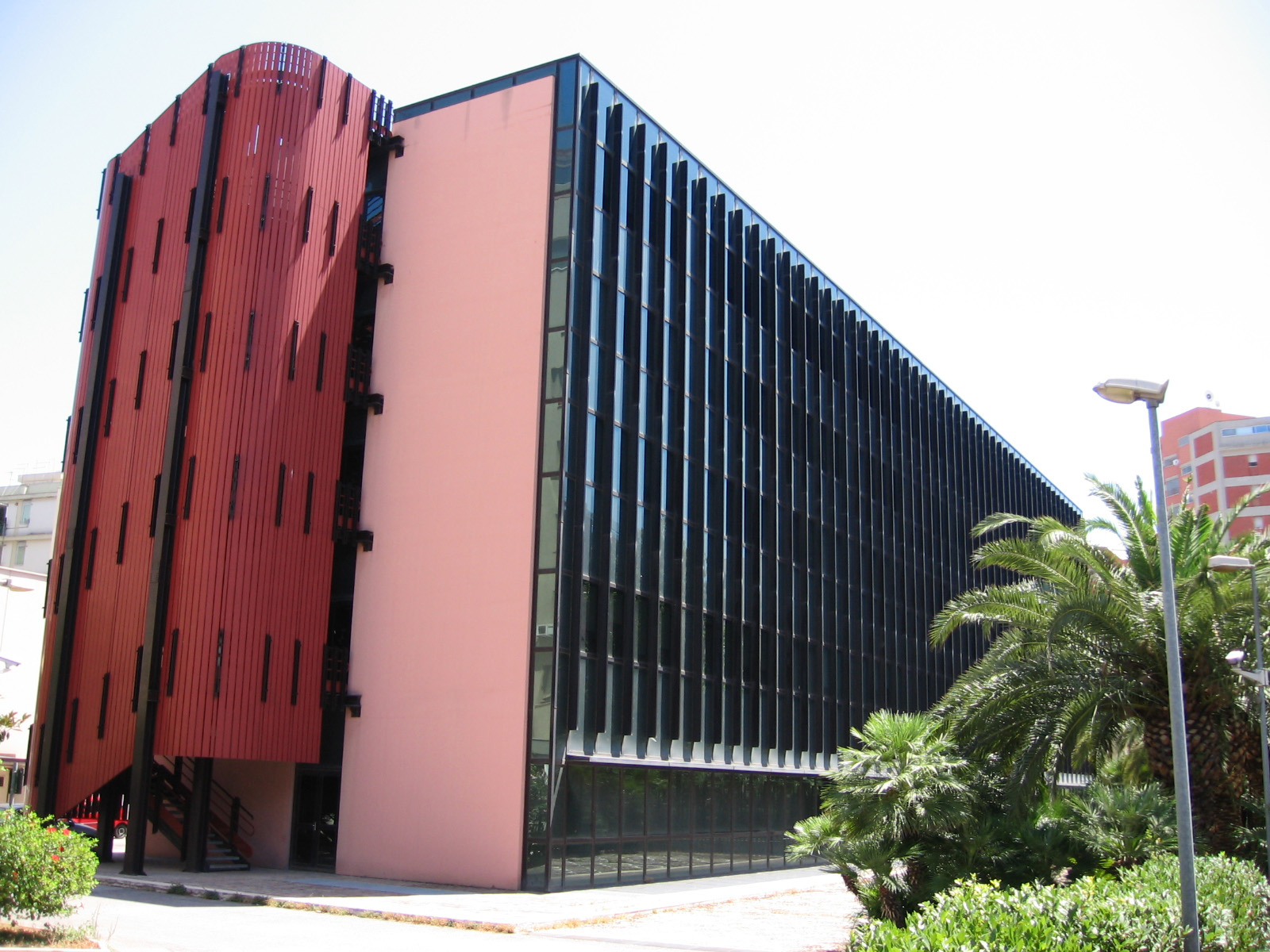 RAI Palermo